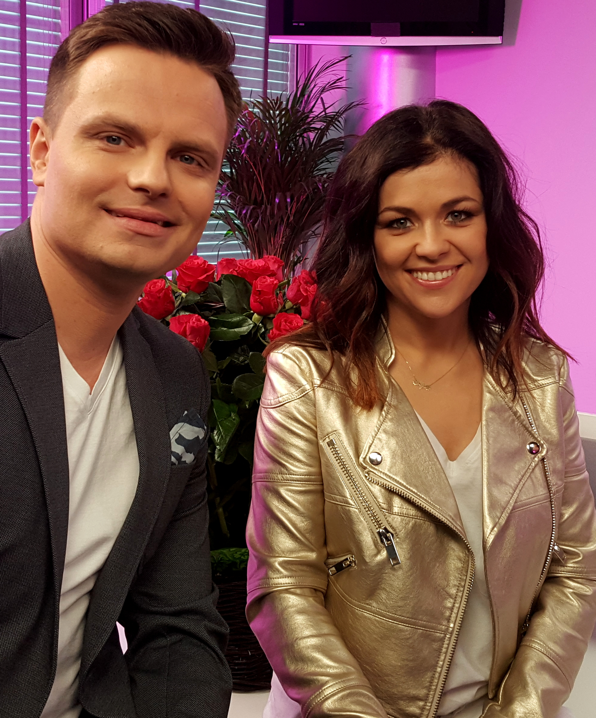 Polski tancerz Marcin Hakiel i aktorka Katarzyna Cichopek na planie programu "Gwiazdy Cejrowskiego" w 2018 roku.